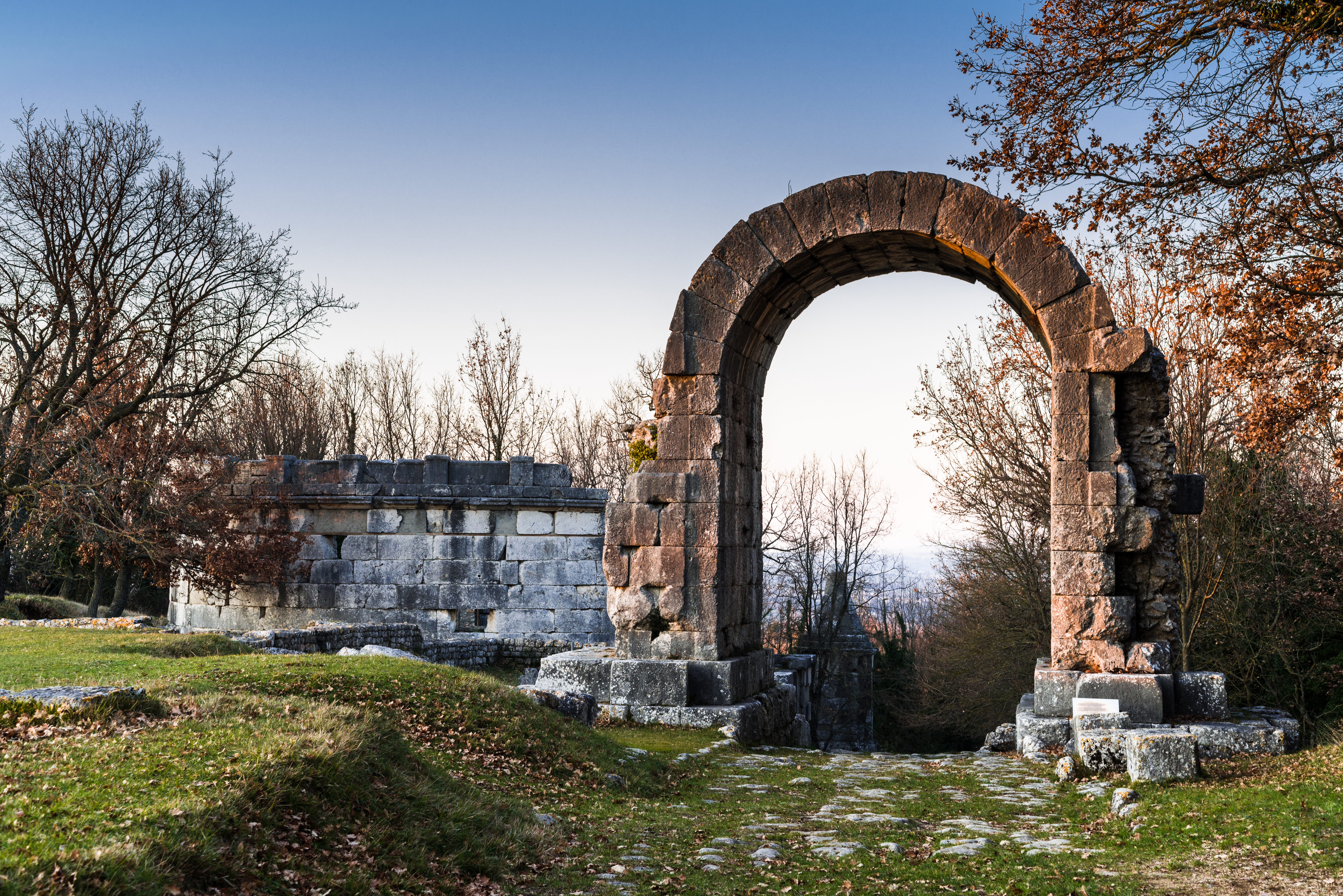 Resti archeologici di Carsulae (Terni).